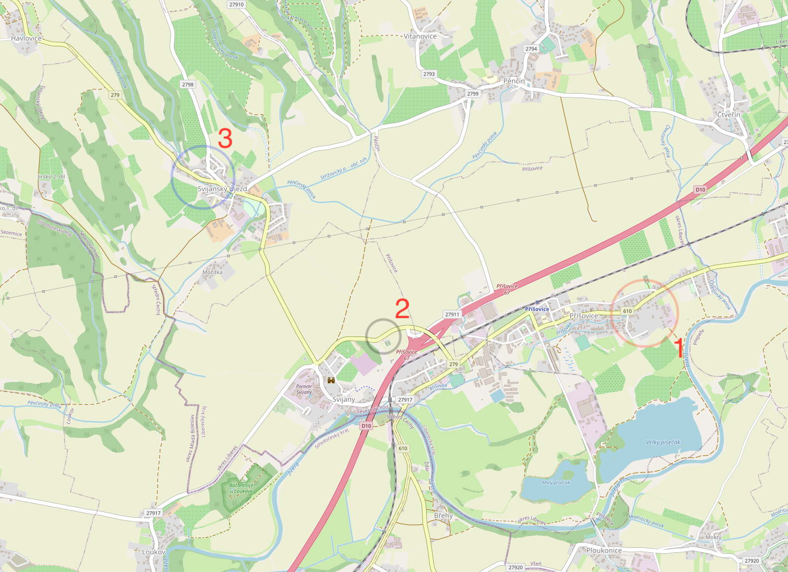 Bod č. 1 znázorňuje bydliště zmizelé. Bod č. 2 znázorňuje poslední místo výskytu. Bod č. 3 znázorňuje bydliště tety Ivany Koškové, kam měla zmizelá namířeno.